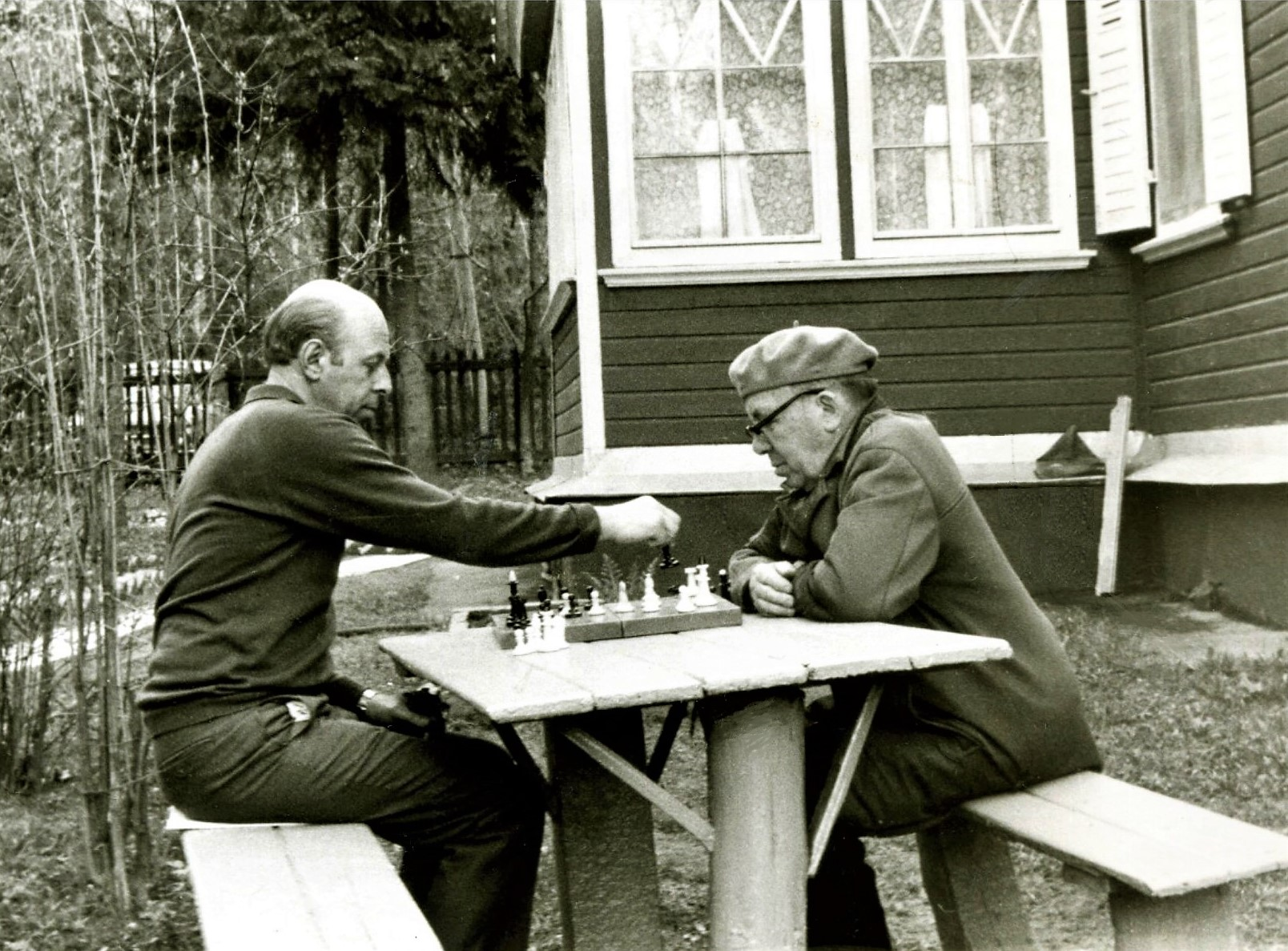 Одним из любимых хобби Иосифа Ираклиевича Гусаковского была игра в шахматы — занятие настоящих тактиков и полководцев. На снимке И.И. Гусаковский во время розыгрыша очередной партии на подмосковной даче во Внукове